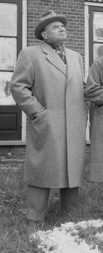 Georg Jacoby bij filmopnamen in de bollenstreek.